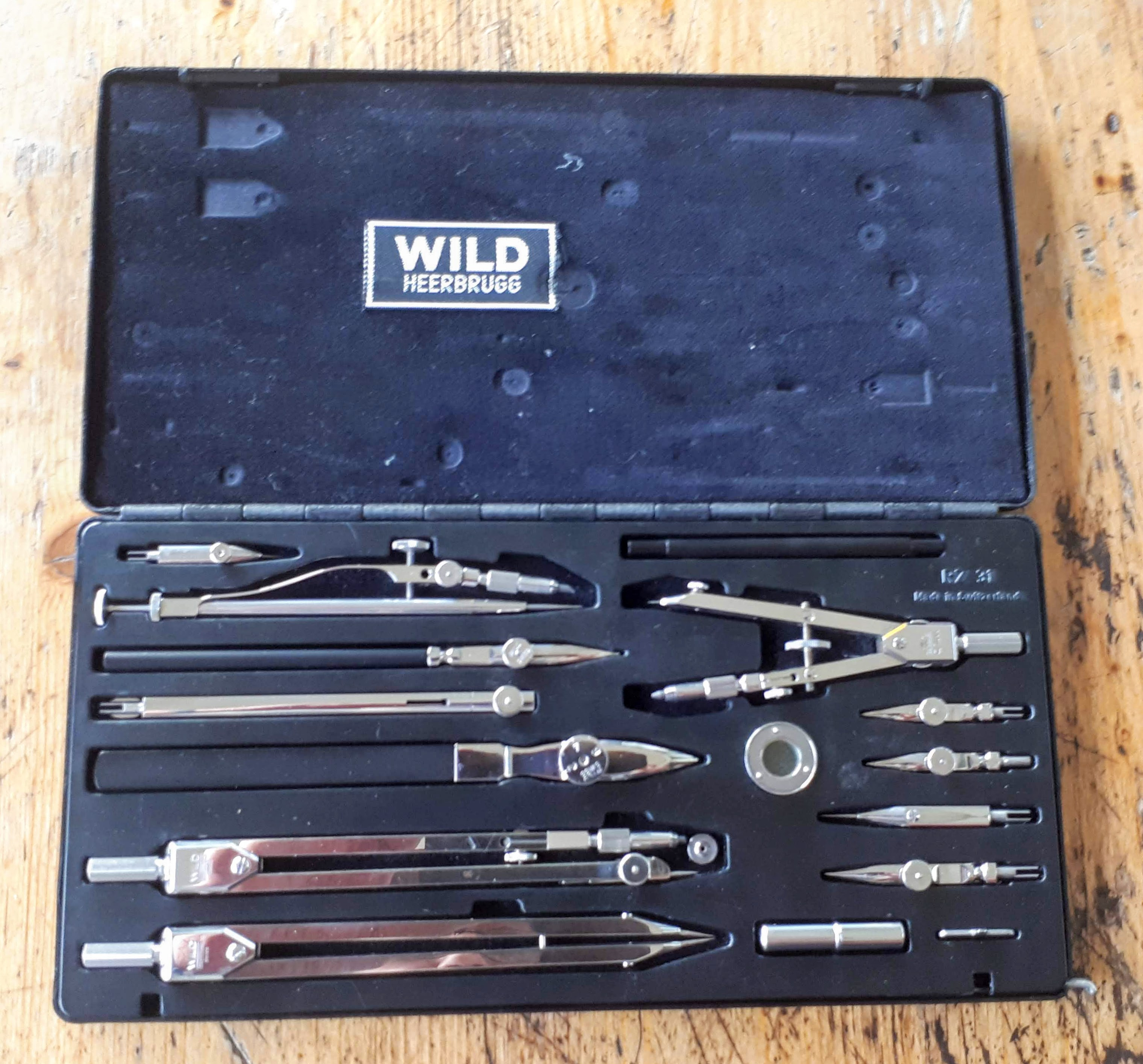 Altes Reisszeug Set - RZ31 von Wild Heerbrugg AG. Wild Heerbrugg produzierte Präzisions-Reisszeug aus rostfreiem Chrom-Stahl zwischen 1942 und 1972.